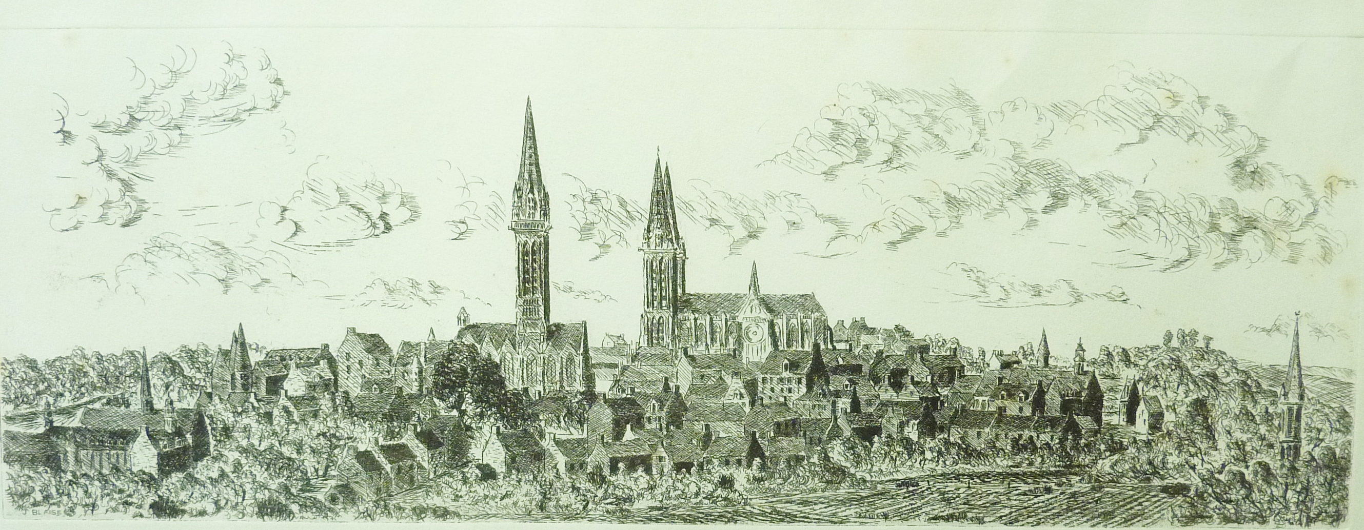 Vue panoramique de Saint-Pol-de-Léon (dessin non daté, auteur anonyme, dessin exposé dans la chapelle Notre-Dame du Kreisker)